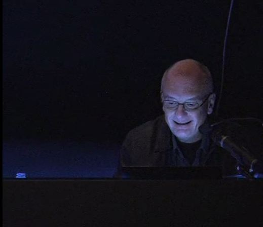 Jesús González Requena dando una conferencia sobre Pedro Almodóvar